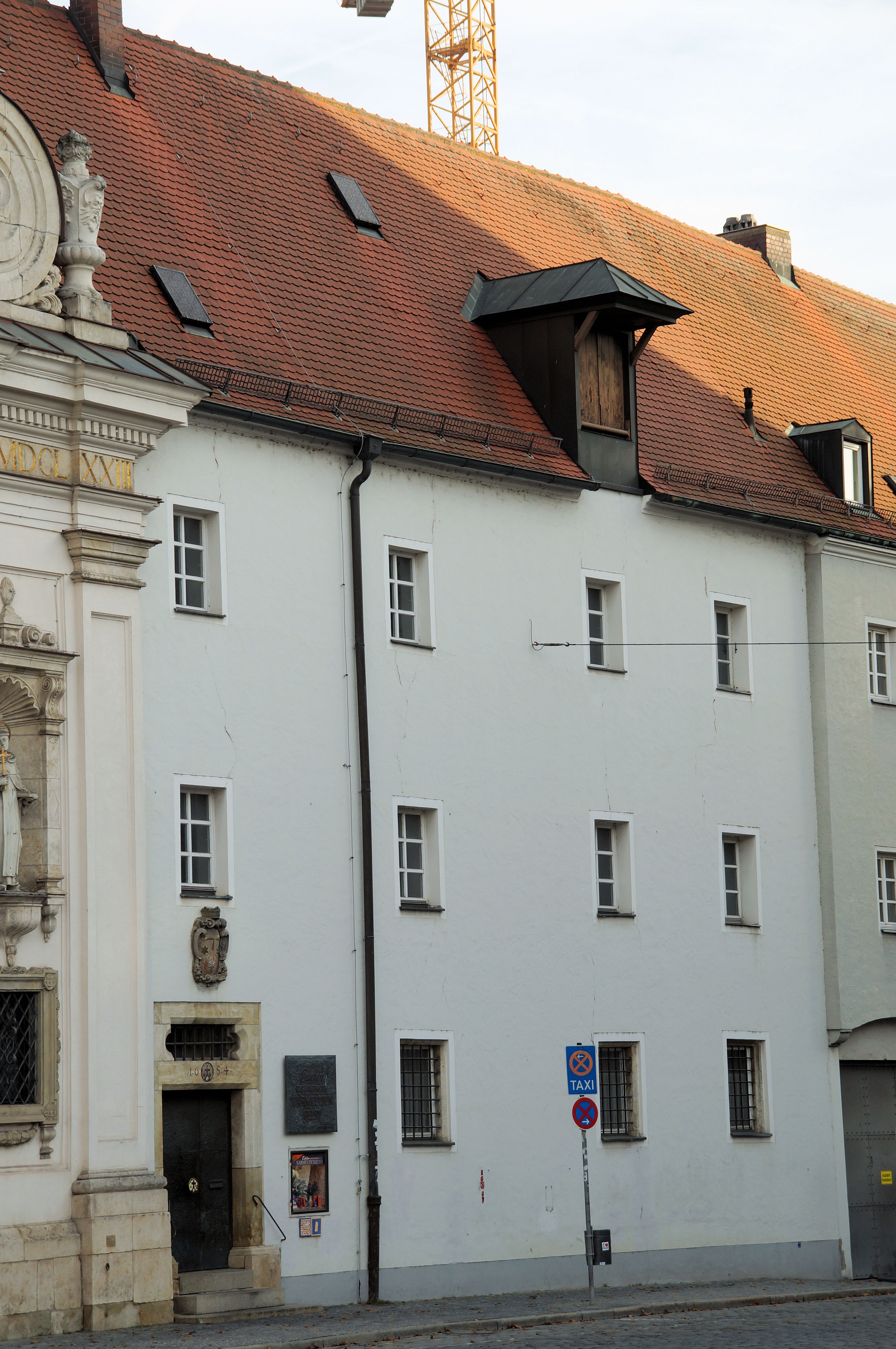 Mehrflügelanlage südlich und östlich der Karmelitenkirche, um zwei Höfe angeordnete dreigeschossige Sattel- und Walmdachbauten: Pfortentrakt, zum Alten Kornmarkt traufständiger Satteldachbau; Konventbau, langgestreckter Walmdachbau mit Kreuzgang; Sakristeitrakt, dreigeschossiger Verbindungstrakt zwischen Konventbau und Chor mit Sommer- und Wintersakristei und integriertem Kirchturm; Fabrikbau, dreigeschossiger Walmdachbau an der Ostseite, 1641 Grundsteinlegung, 1653-55 anstelle des älteren Freisinger Hofes errichtet, bez. 1654; Sakristeitrakt 1676, mit älteren Bauteilen, wohl 13. Jh. This is a photograph of an architectural monument.